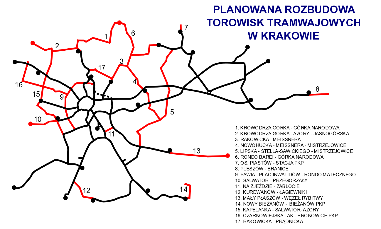 Przyszłość sieci tramwajowej w Krakowie